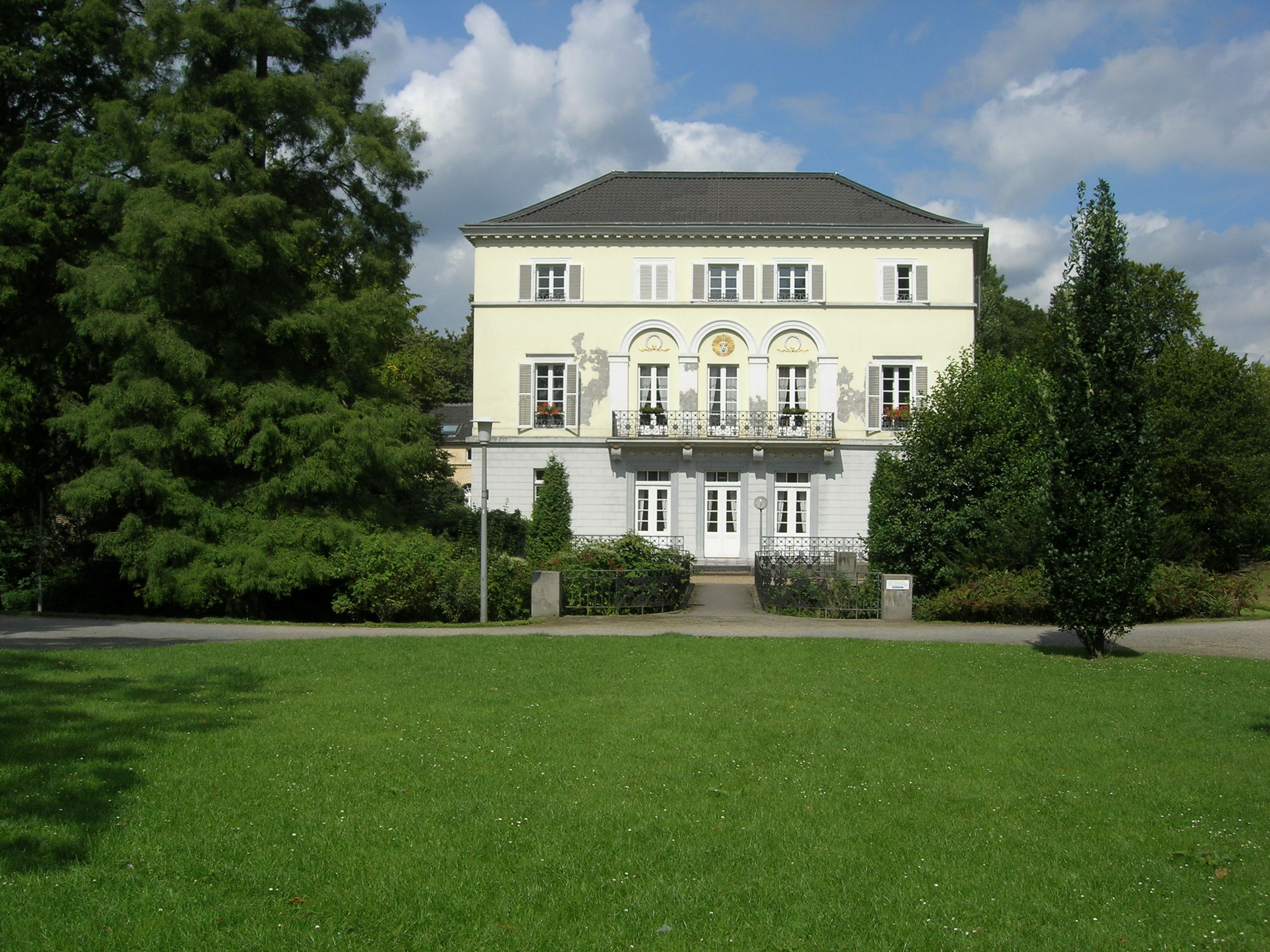 Haus Sollbrüggen - Musikschule der Stadt Krefeld